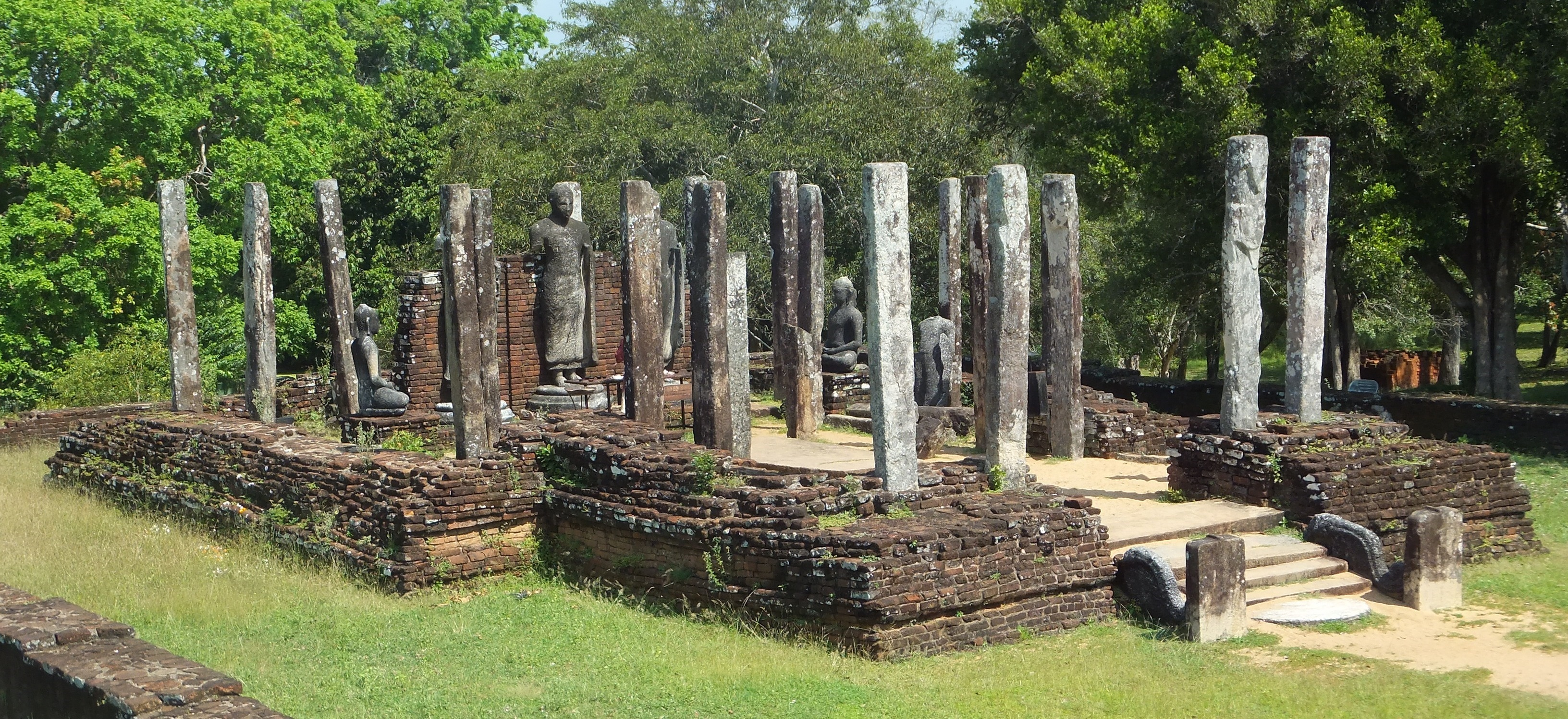 සිංහල: මැදිරිගිරියේ පිහිටා ඇති පුරාණ මණ්ඩලගිරි සංකීර්ණයට අයත් පිළිම ගෙයක්